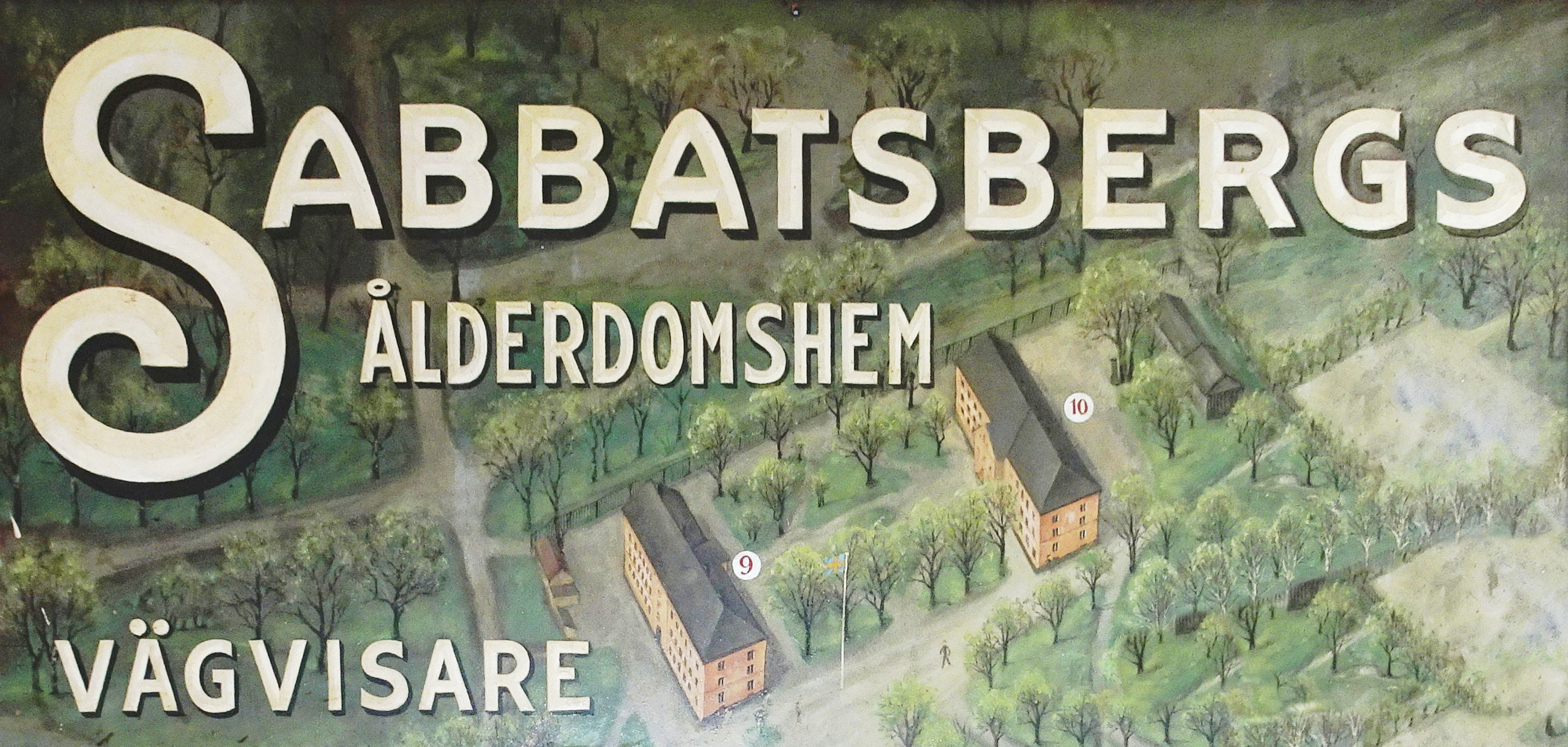 Sabbatsbergs Ålderdomshem, del av större skylt med Johanneshuset (10) och Adolf Fredrikhuset (9)